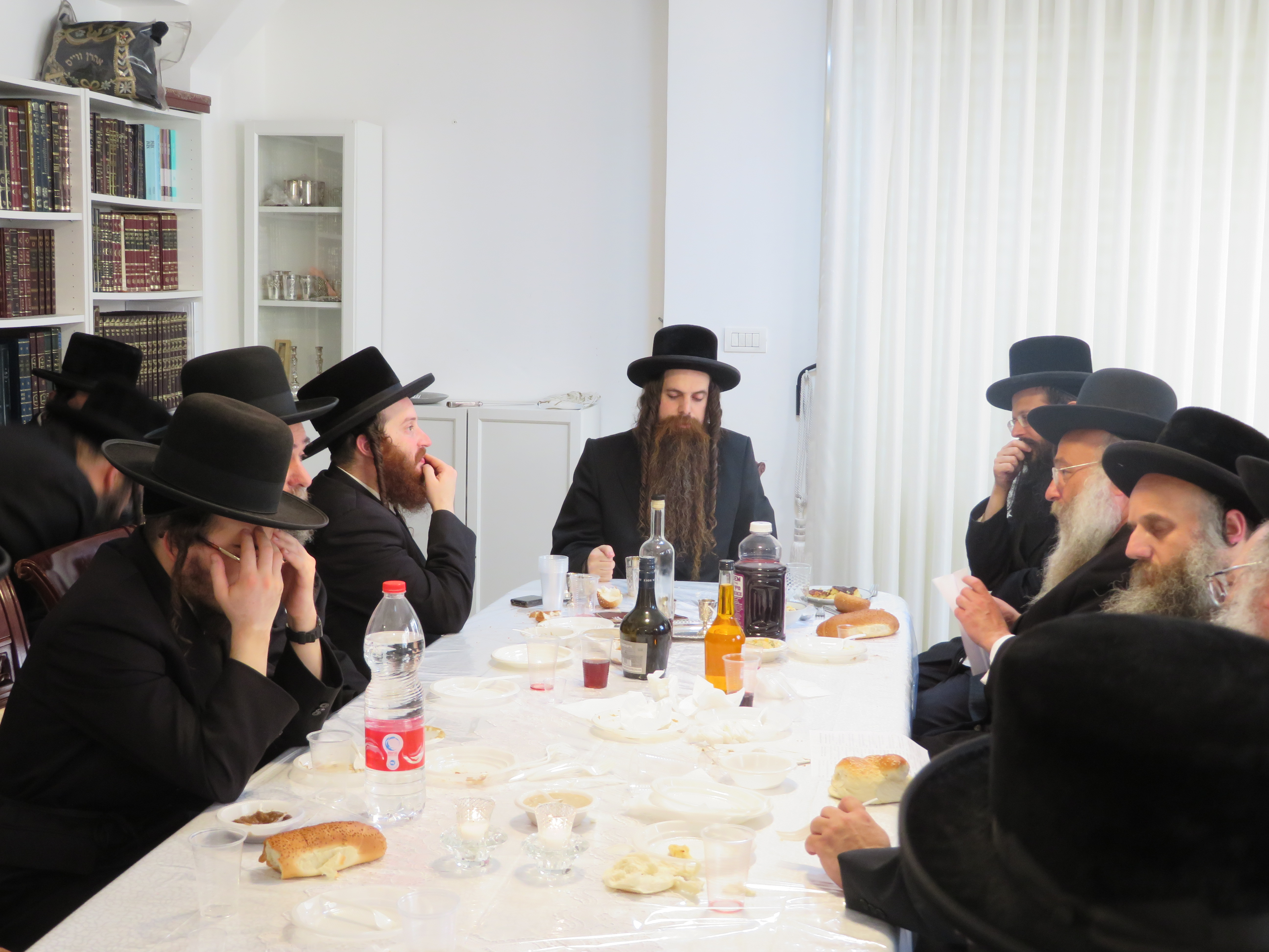 הרב מנחם קאליש, האדמו"ר מאמשינאוו שליט"א טיש ל"ג בעומר תש"פ